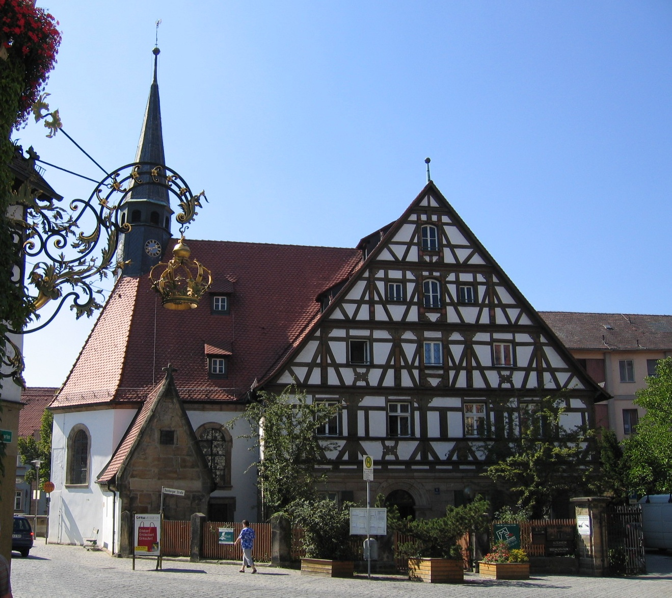 Spitalkirche St. Katharina, Spätes Mittelalter, Sakristei: 1490, Renoviert: 1982 in Forchheim (Oberfranken)